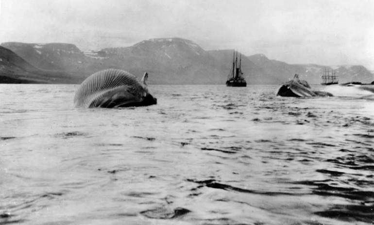 Hvalveiðar í Dýrafirði á Vestfjörðum.